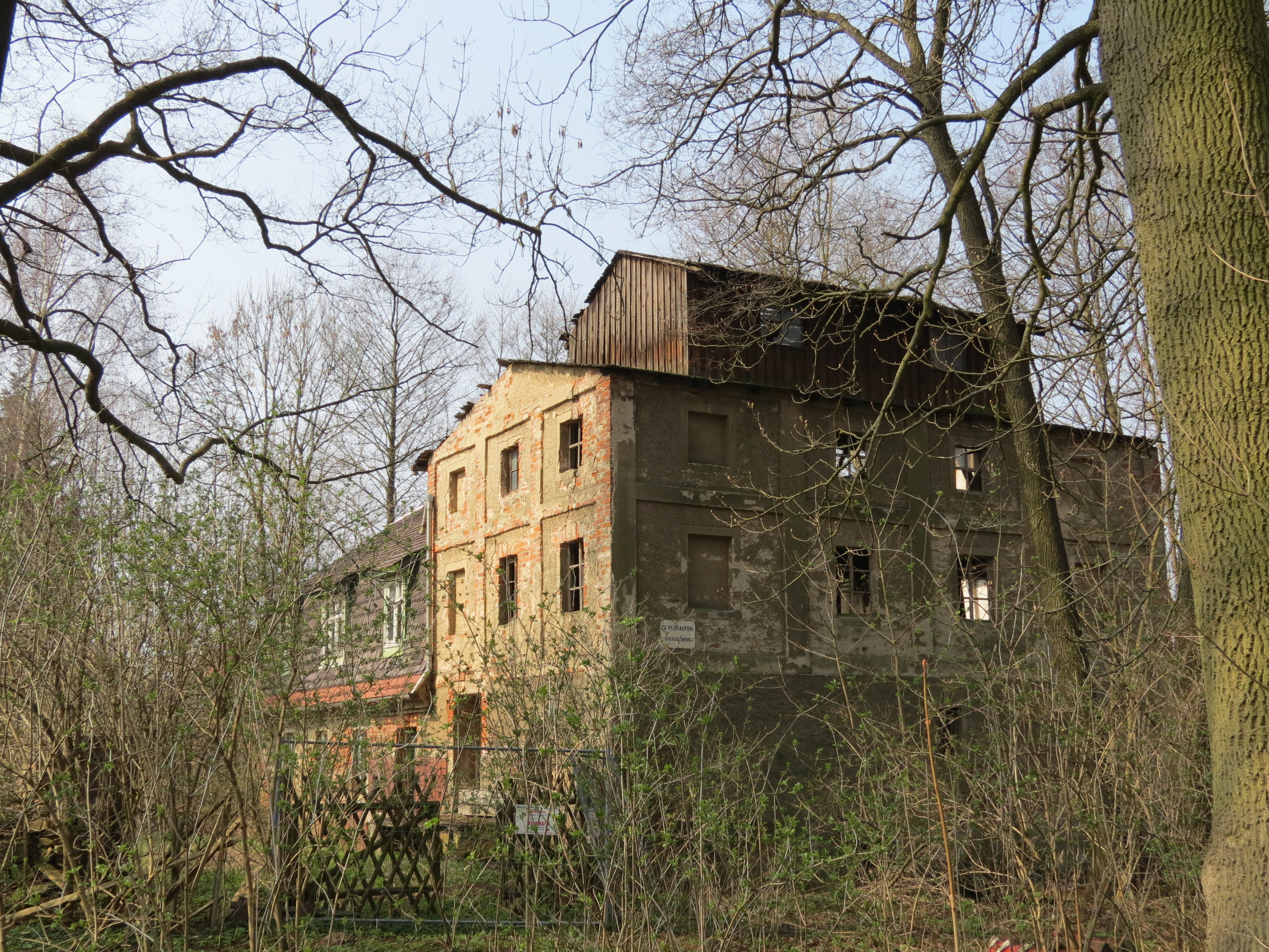 Lamsfeld, Gemeindeteil von Lamsfeld-Groß Liebitz, Ortsteil der Gemeinde Schwielochsee, Landkreis Dahme-Spreewald, Brandenburg, Deutschland